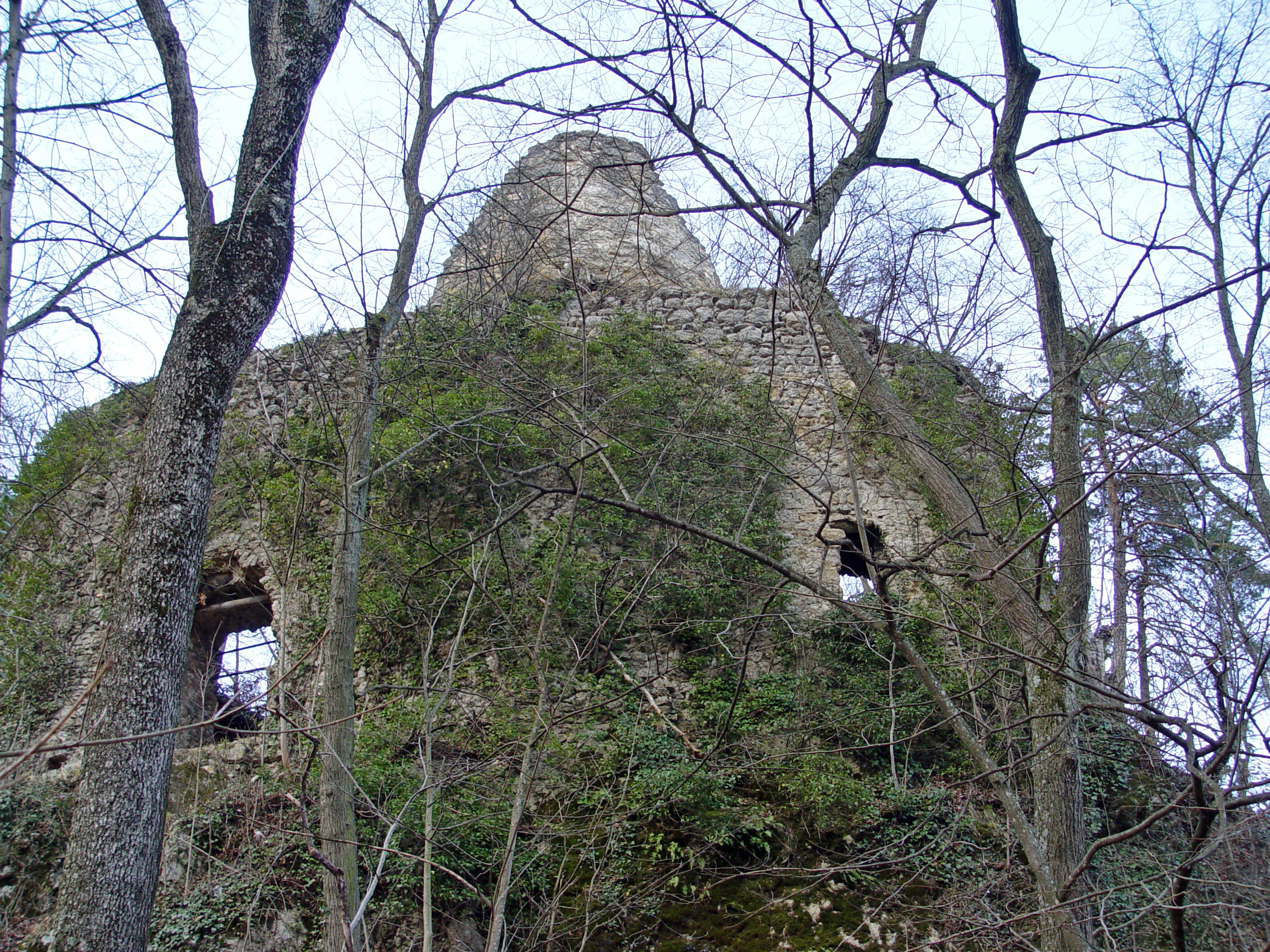 Von dem umliegenden Wald sind Turmreste und Fenster der Burg Schalberg gut erkennbar. Über ein Pfad gelangt man zu der Ruine.